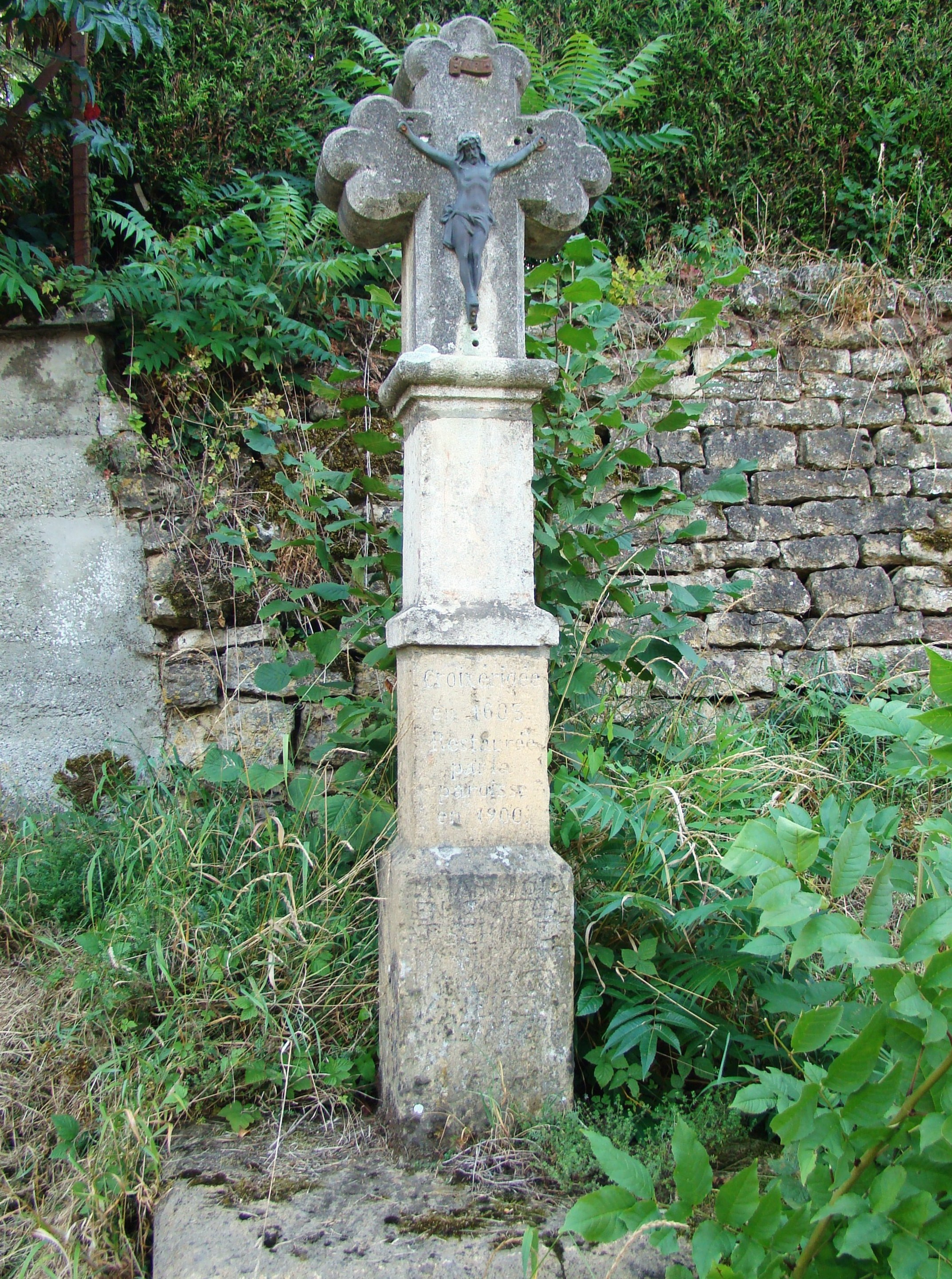 Croix située rue de Habergy à Udange. Sur la stèle on peut lire : « Croix érigée en 1605. Restaurée par la paroisse en 1900. » Déclassée le 10 mai 2017.